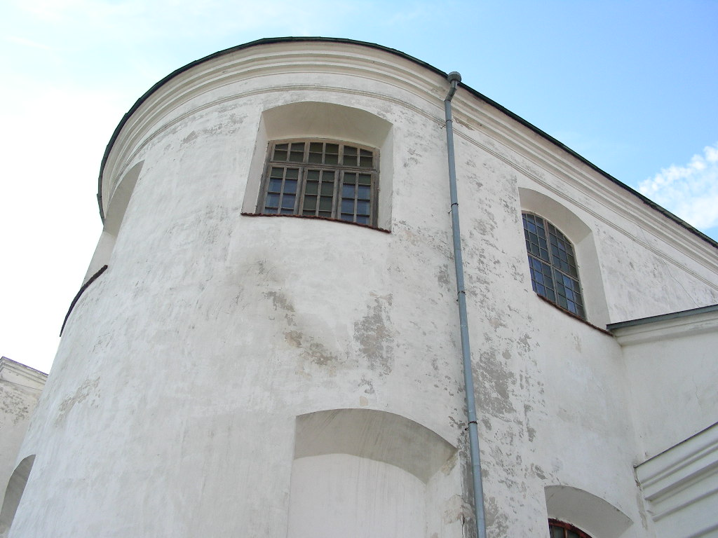 Беларуская (тарашкевіца): Міхайлаўскі касьцёл былога кляштара дамініканцаў. г. Наваградак This is a photo of Belarusian heritage monument. Reference number: 411Г000437 ( WLM)